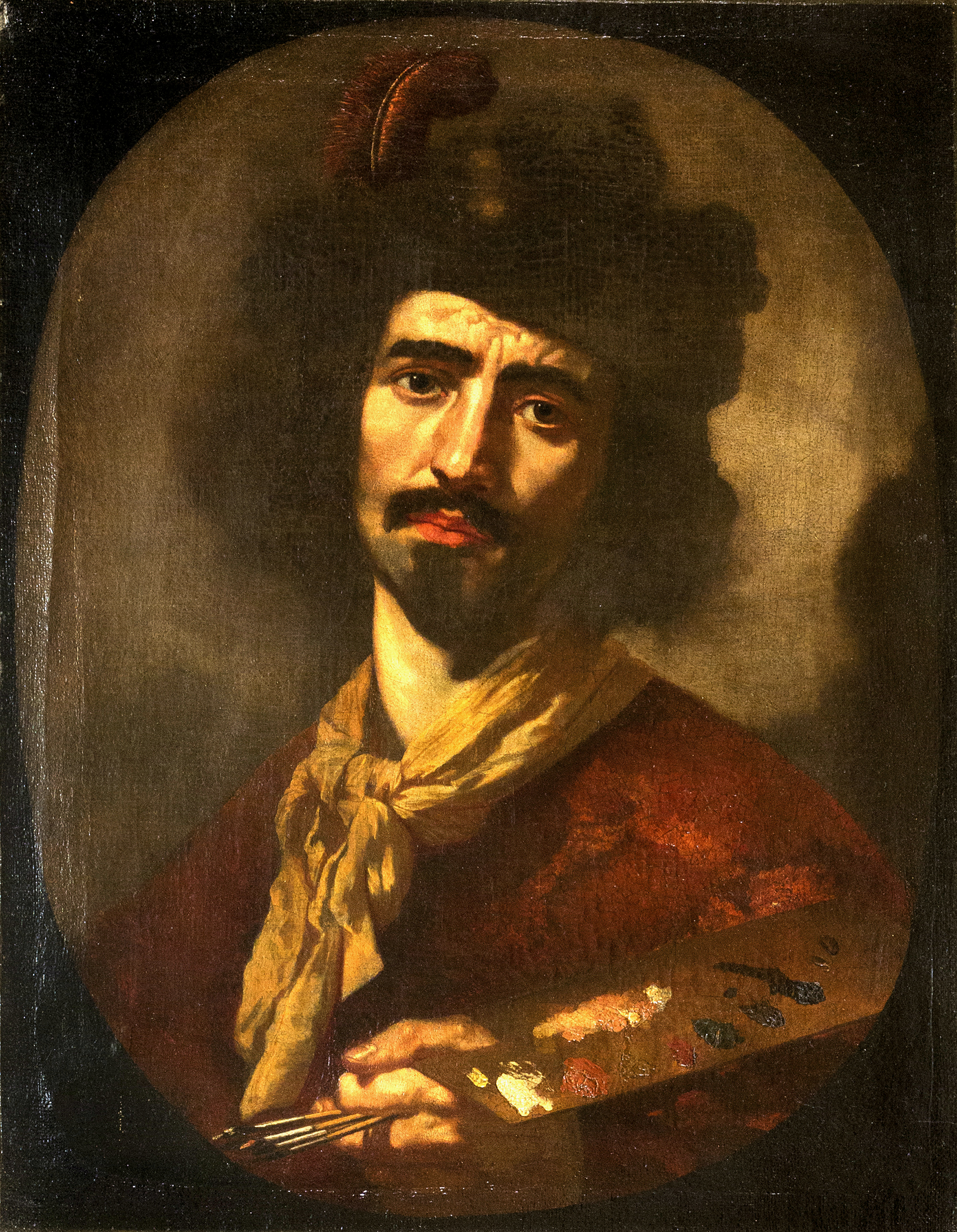 Autoritratto